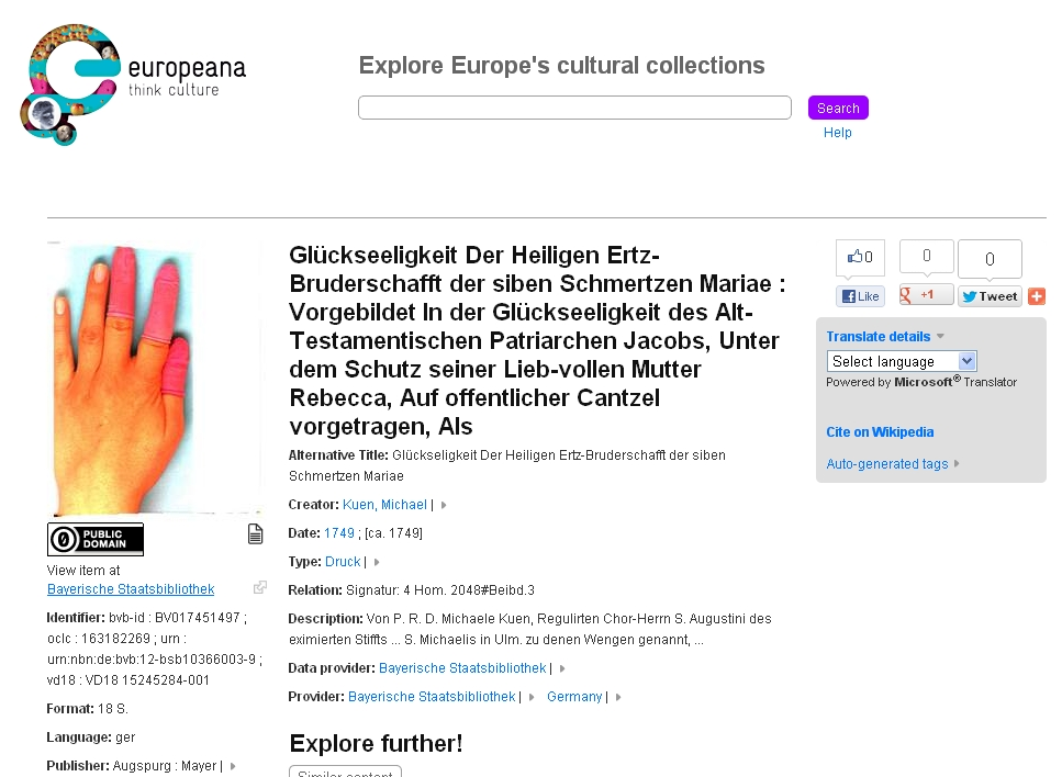 Europeana, Eintrag zu einem Google-Digitalisat aus München